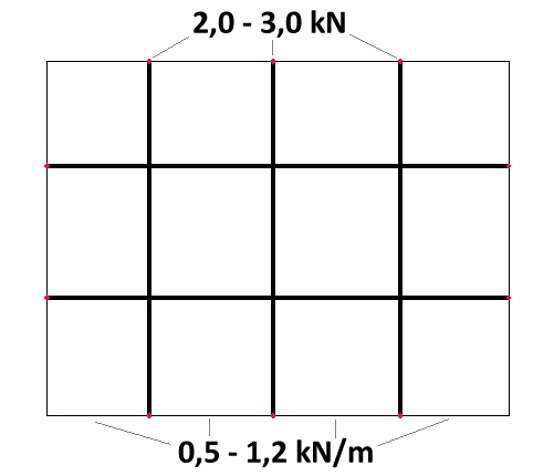 Arbeitsplattformnetz: Krafteintragung in die vorhandene Baukonstruktion Traversegurt-Anschlagpunkte: ca. 2,0 - 3,0 kN, Randbereich: ca. 0,5 - 1,2 kN/m Feldgröße ca. 1,6 - 2,2 m